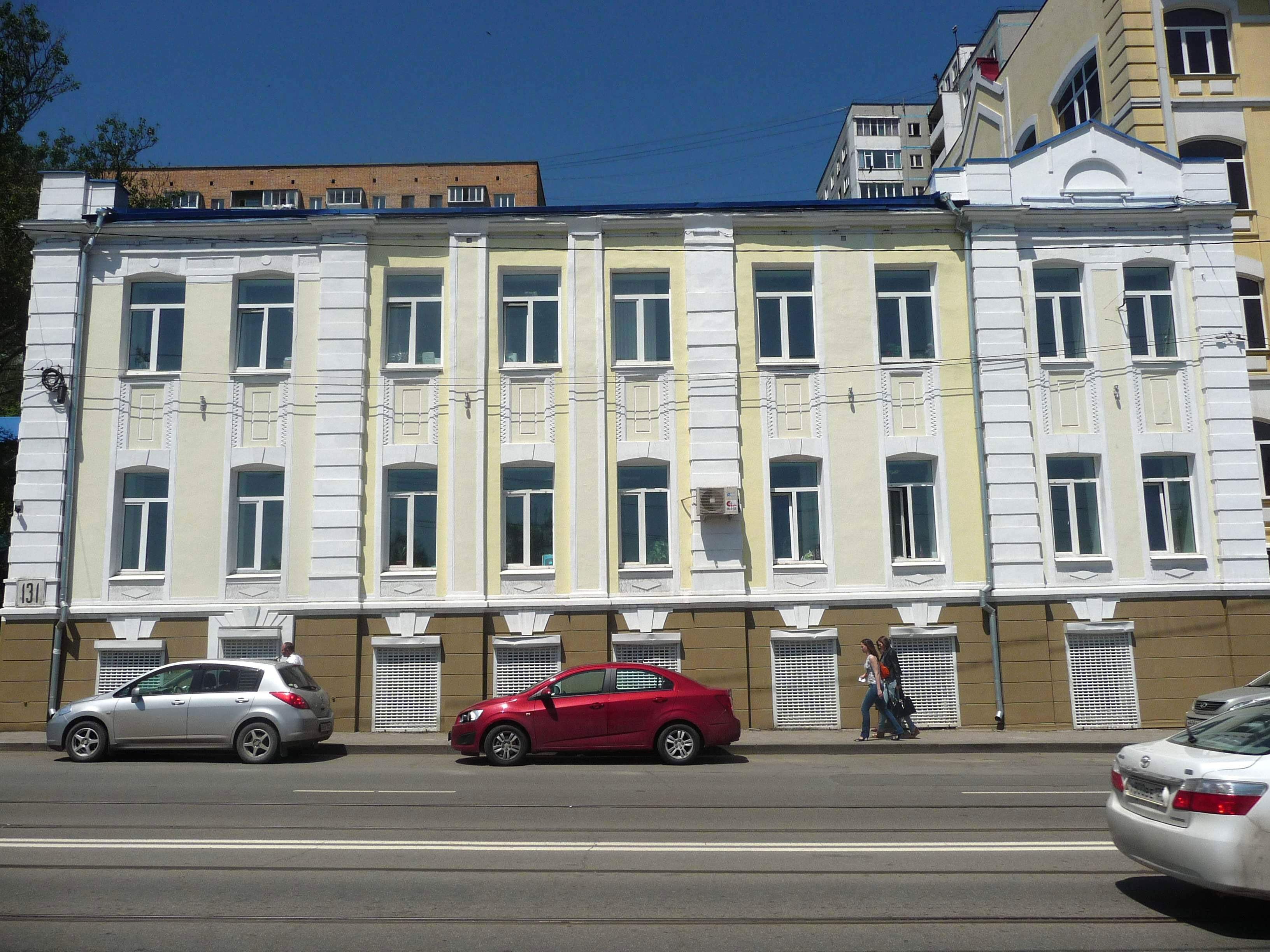 Владивосток, ул. Светланская, 131, 2012-07-05